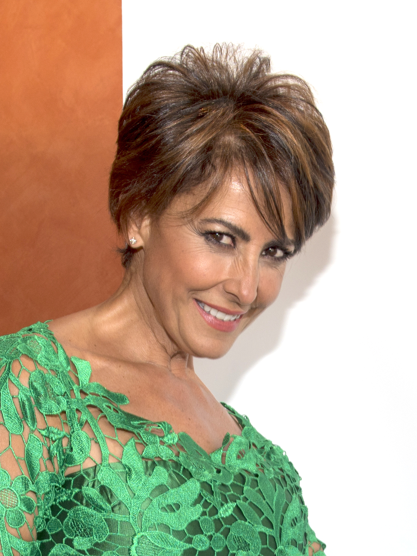 Irma Soriano, Premio Jaén Paraiso Interior 2015 Martos, 23-9-2015